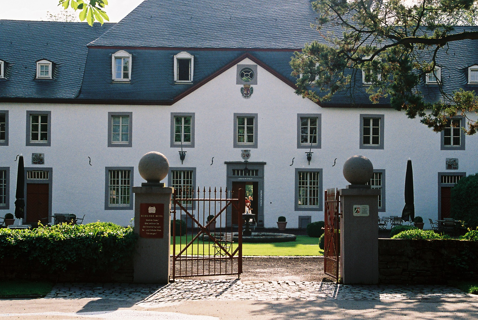 Schloss Auel bei Lohmar-Wahlscheid